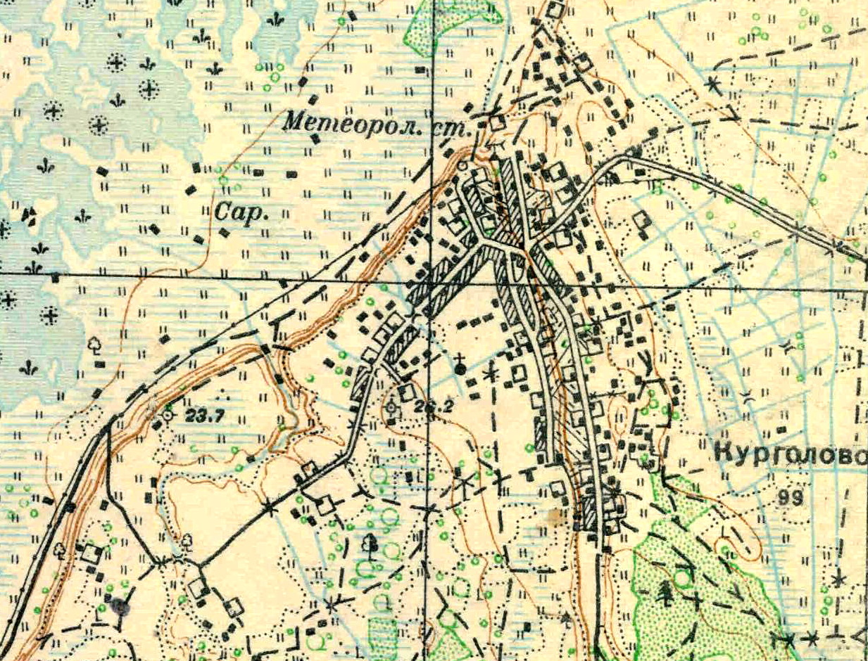 Топографическая карта Ленинградской области, квадрат О-35-9-В-а (Курголово), деревня Курголово